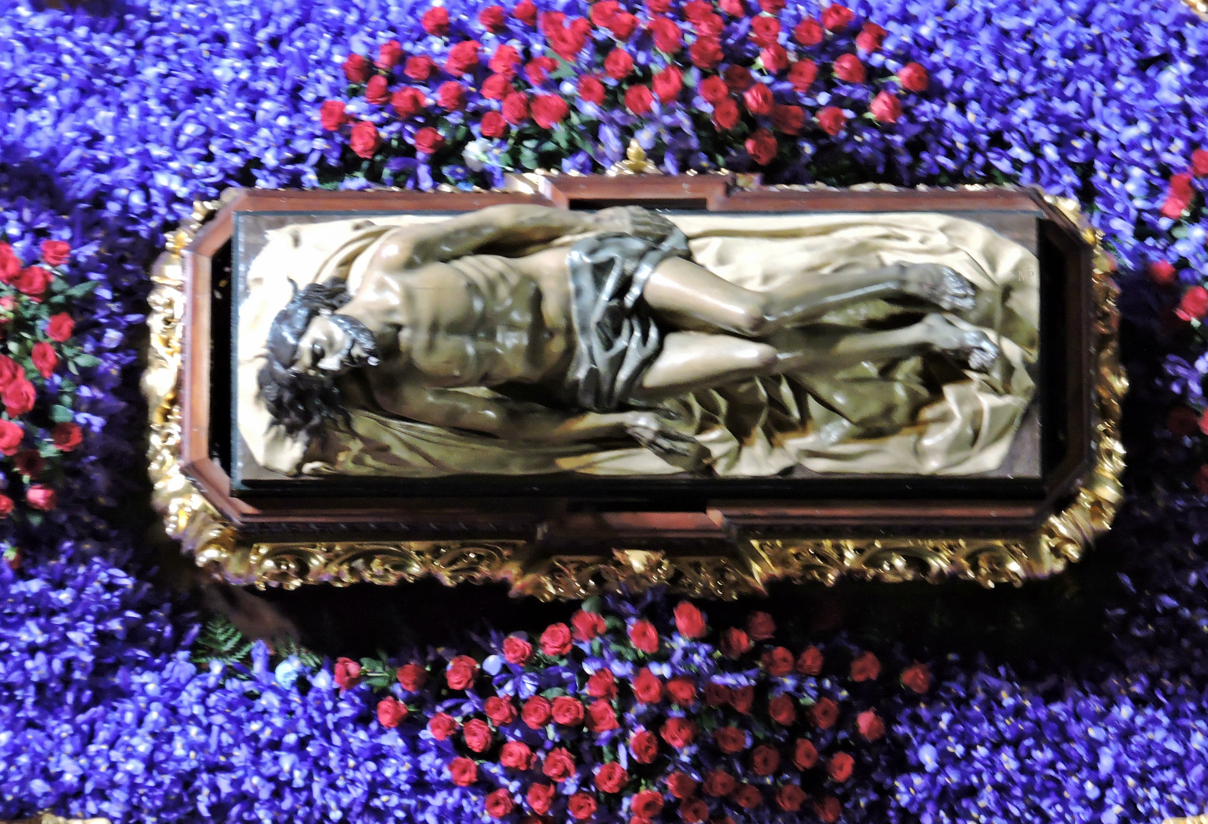 Santísimo Cristo de la Buena Muerte, Hermandad de Labradores Paso Azul, Lorca, Murcia